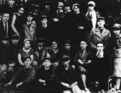 Członkowie bojówki "Betar" w Szydłowcu